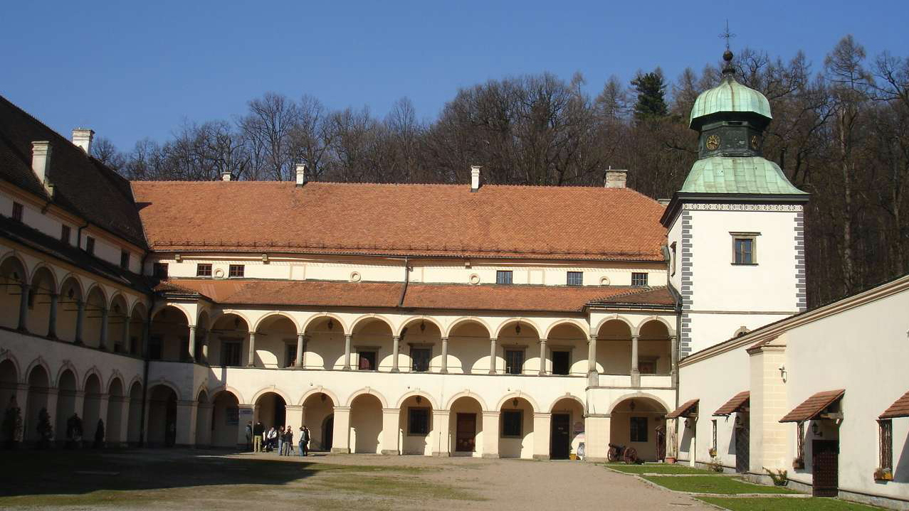 Komorowskis castle in Sucha Beskidzka